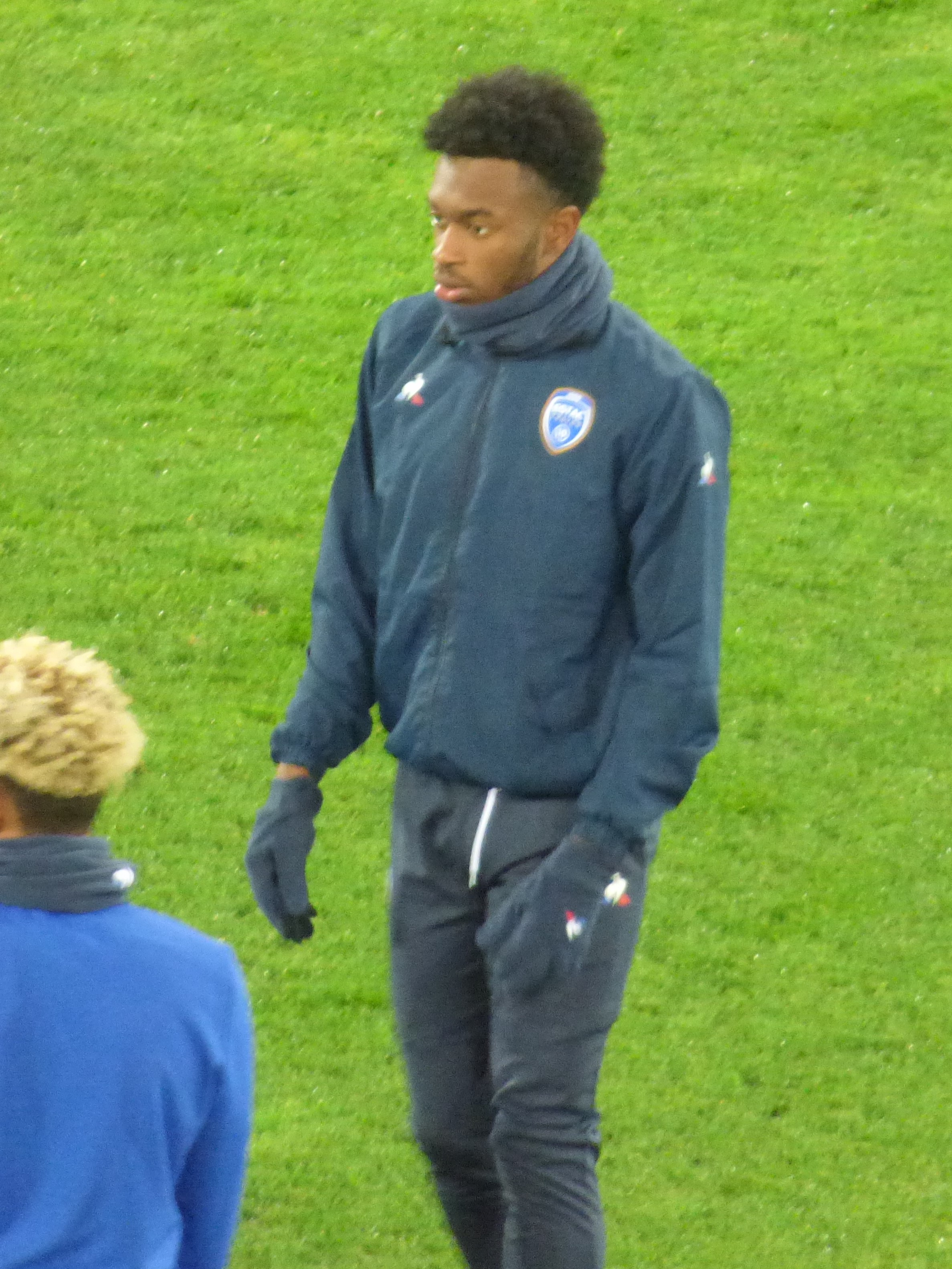 Lenny Pintor lors du match RC Lens / ES Troyes AC, comptant pour la vingt-troisième journée du championnat de France de football de Ligue 2 2019-2020, le 4 février 2020, au Stade Bollaert-Delelis de Lens